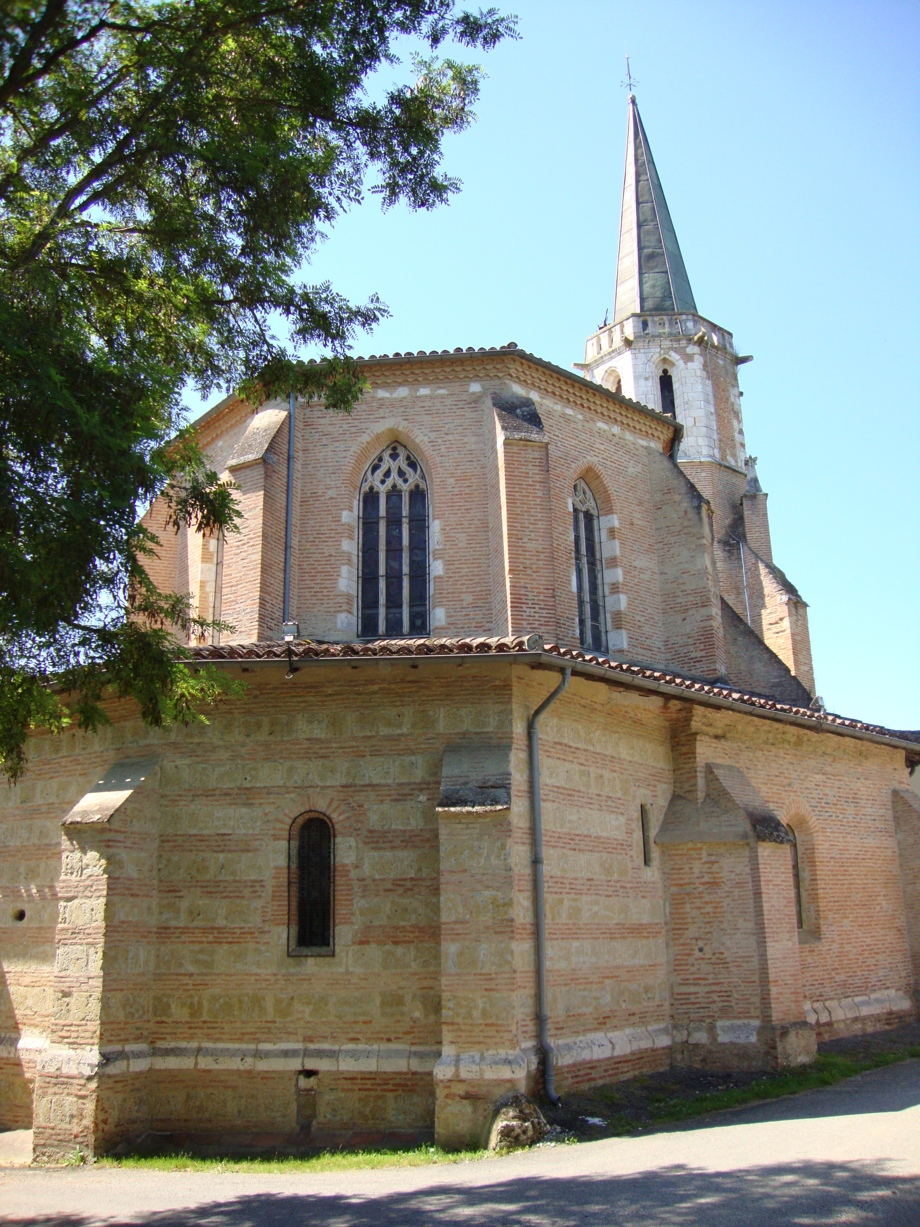 Gimont (Gers, Fr) chapelle N.D. de Cahuzac, extérieur .